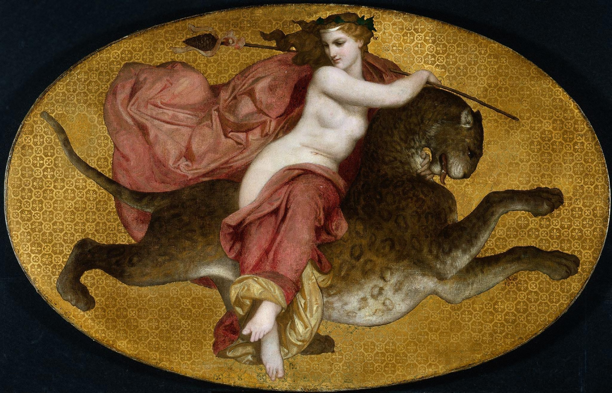 Bacchante sur une panthèrelabel QS:Lfr,"Bacchante sur une panthère"